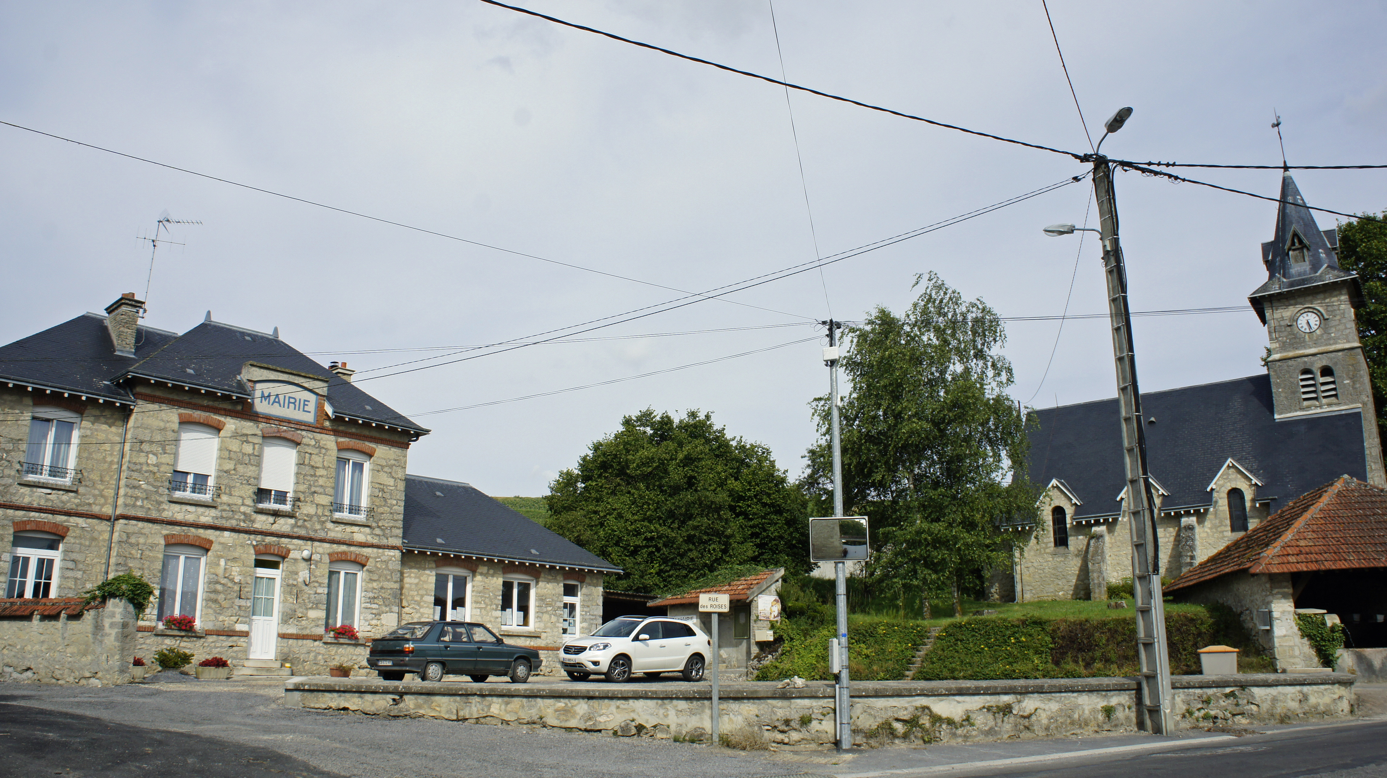 Méry-Prémecy, sa place avec l'église et la mairie.